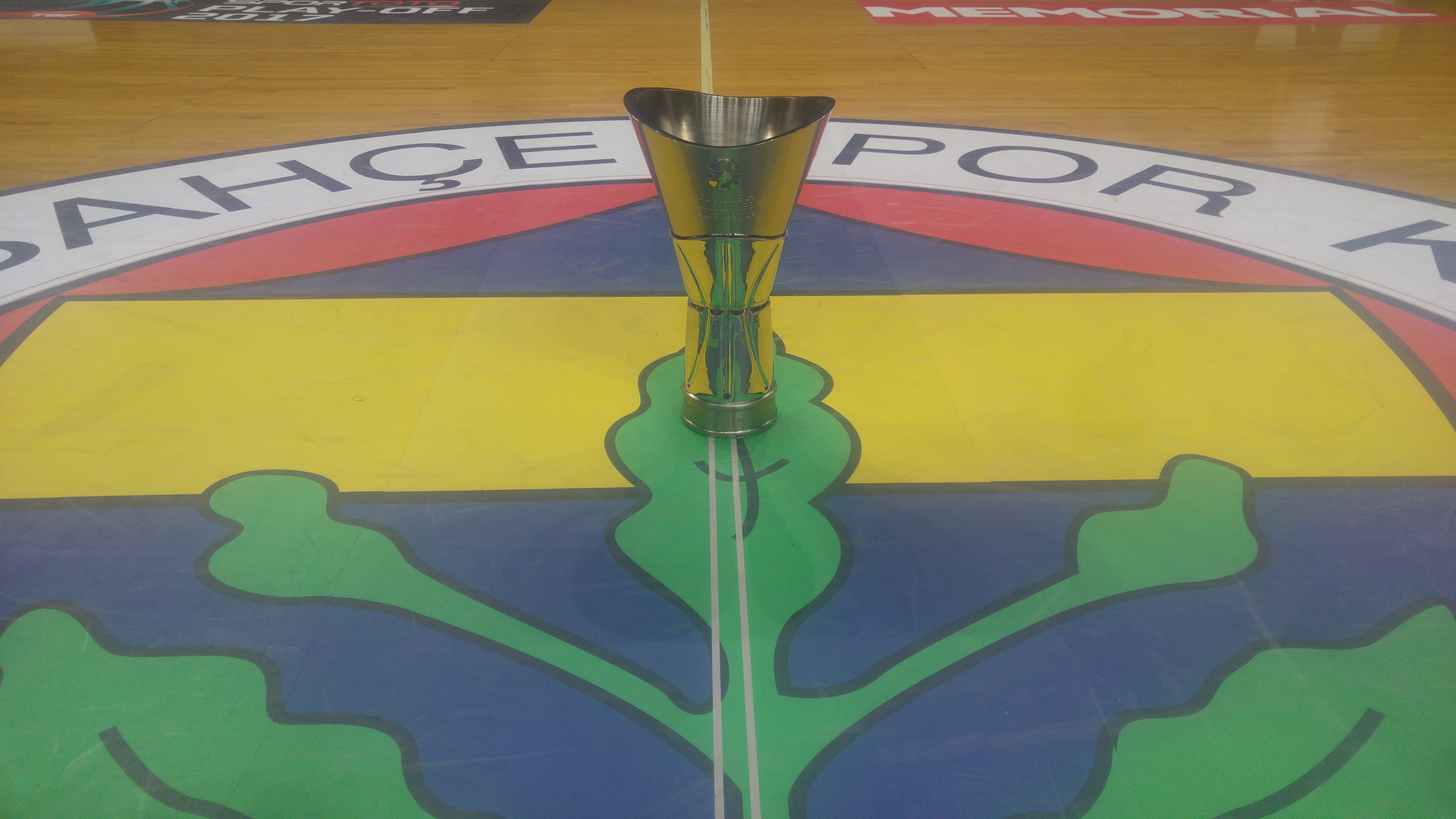 2016–17 EuroLeague Cup